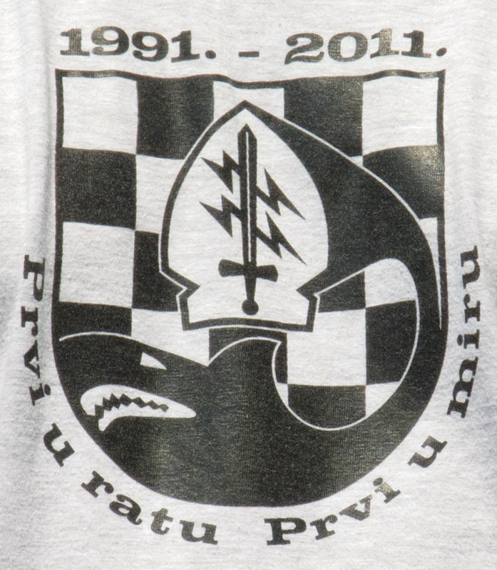 Povorka hrvatskog ponosa i slave; Dan državnosti u Rijeci, Most hrvatskih branitelja iz Domovinskog rata